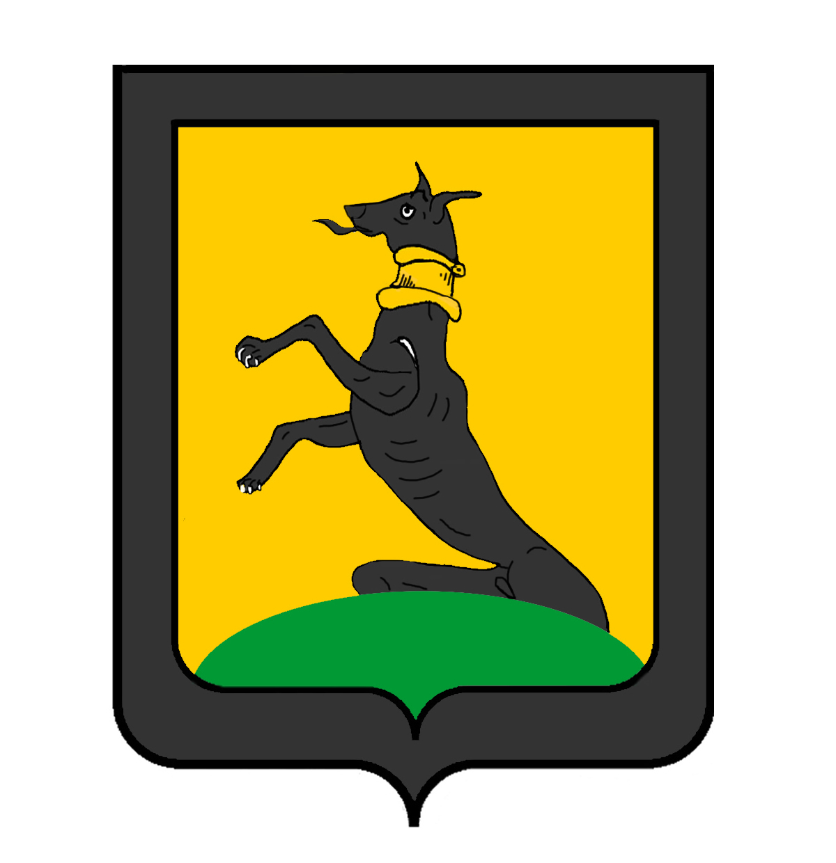 Wappen der Familie Lachenal, Adel ursprünglich aus der Auverne, Frankreich, Familie heute verbreitet in Savoyen und in der Schweiz